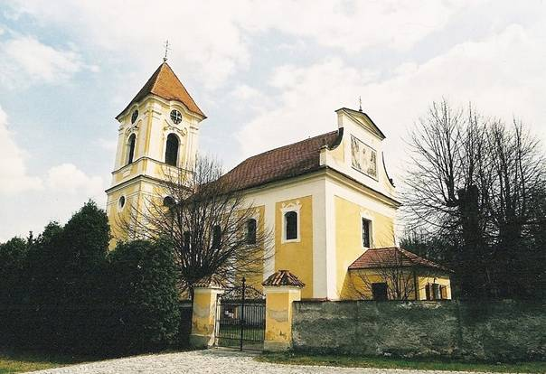 Kostel svatých Šimona a Judy v Bystřici u Benešova